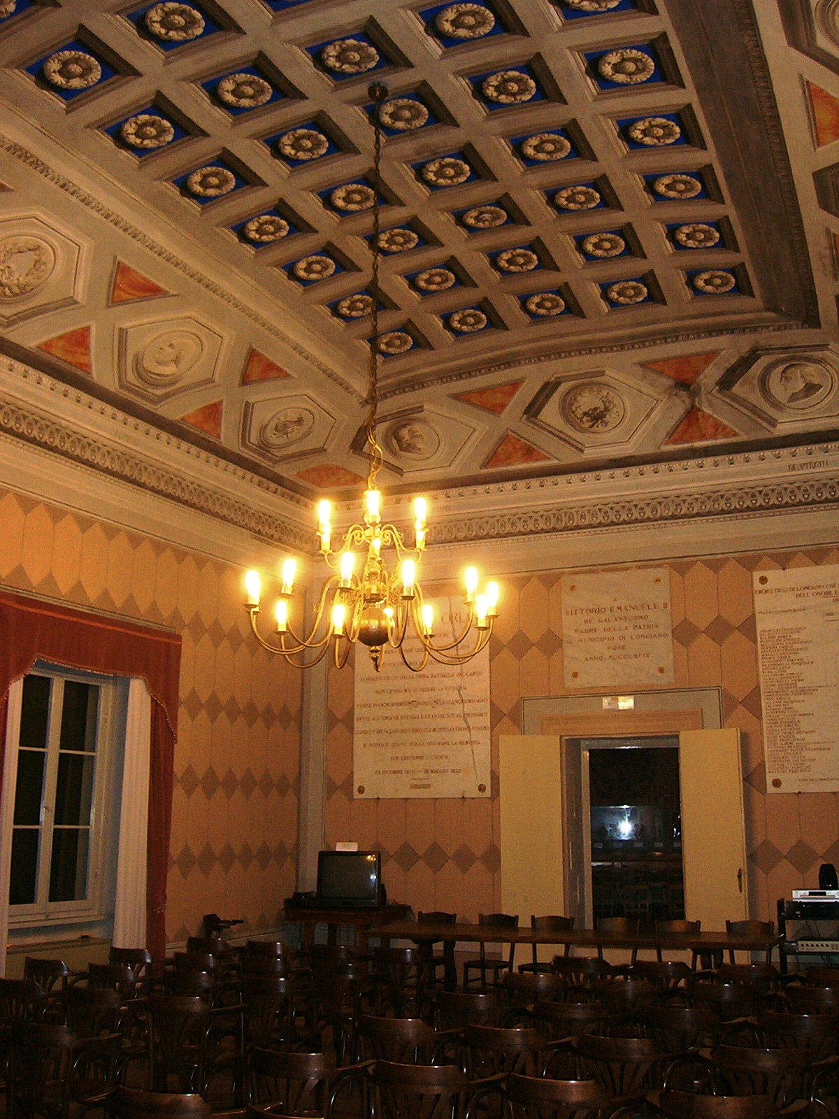 Sala dell'Arengo all'interno del Castello Malatestiano di Longiano.